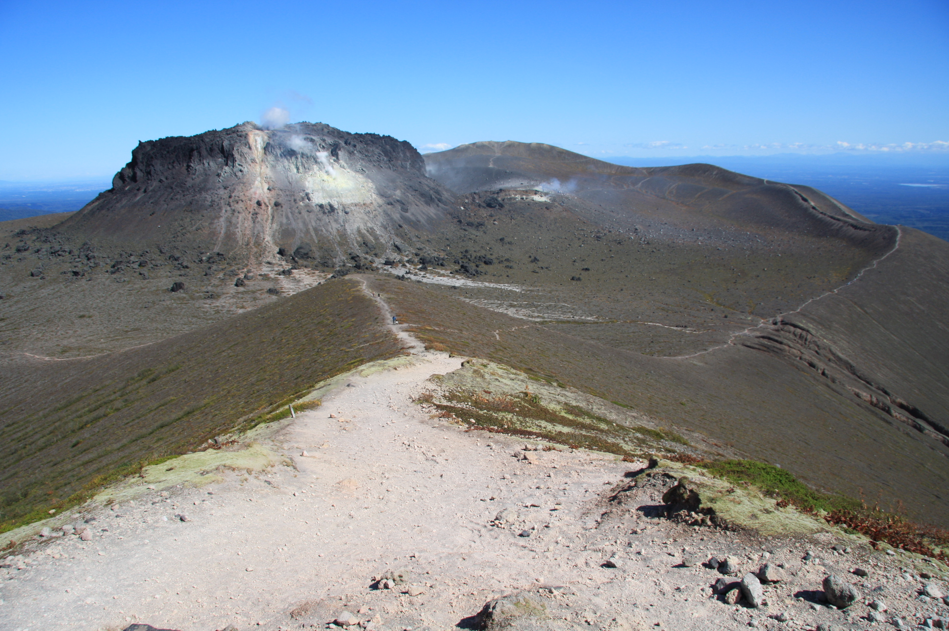 三重式火山の樽前山火口原